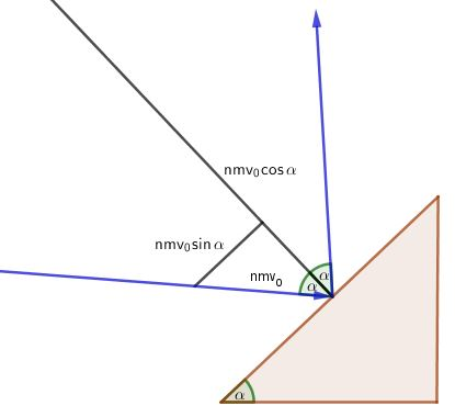 באיור מוצג בכחול החומר הזורם הפוגע במדרון